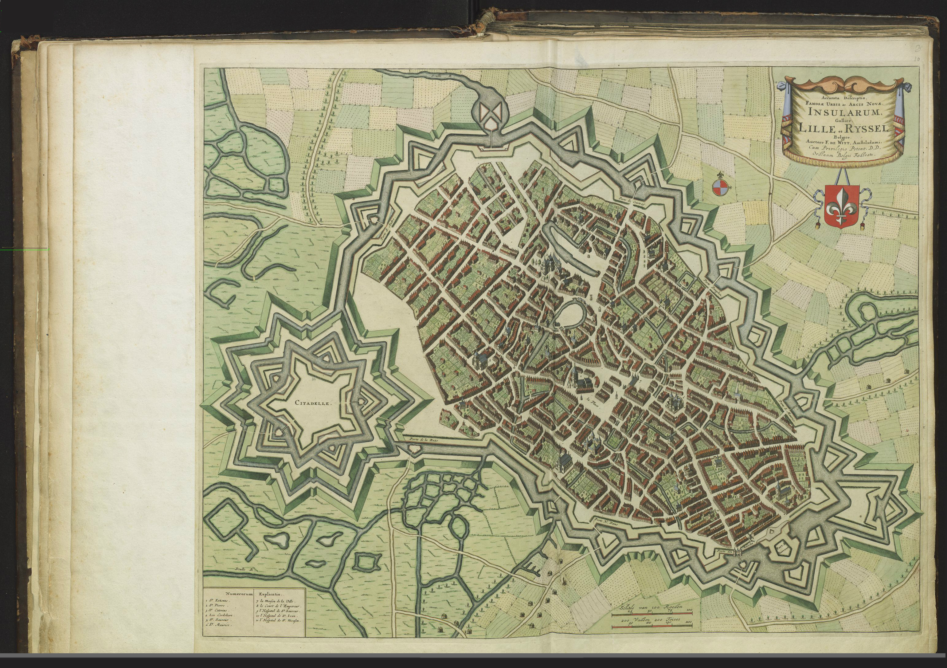 Plattegrond van Lille-Ryssel